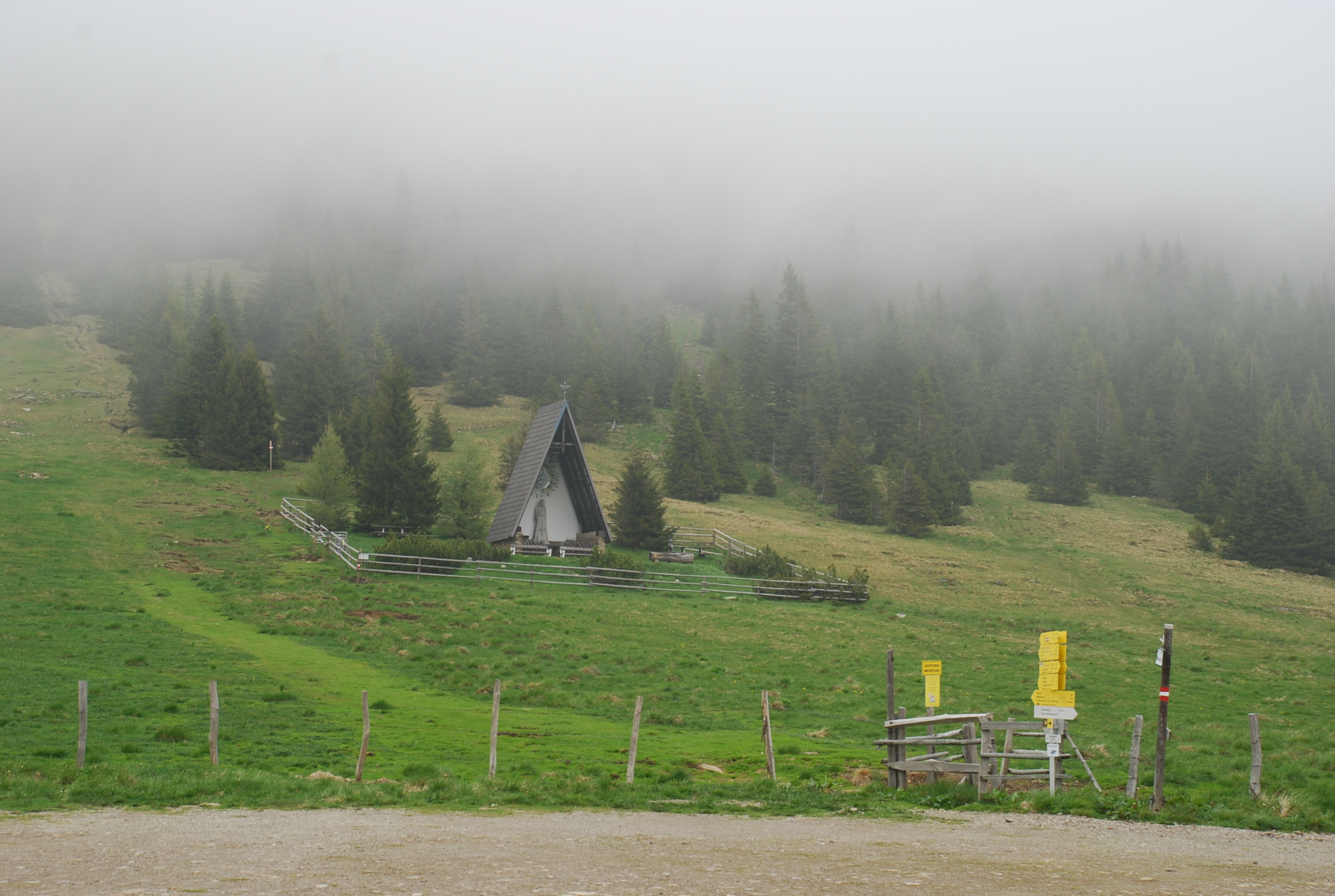 Weinebene: Handalm Passhöhe von der Steiermark/Gressenberg aus